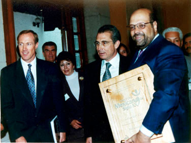 Recibiendo el reconocimiento al Deportista Mexicano del Siglo XX, en Manos del Presidente de México Ernesto Zedillo, 1999